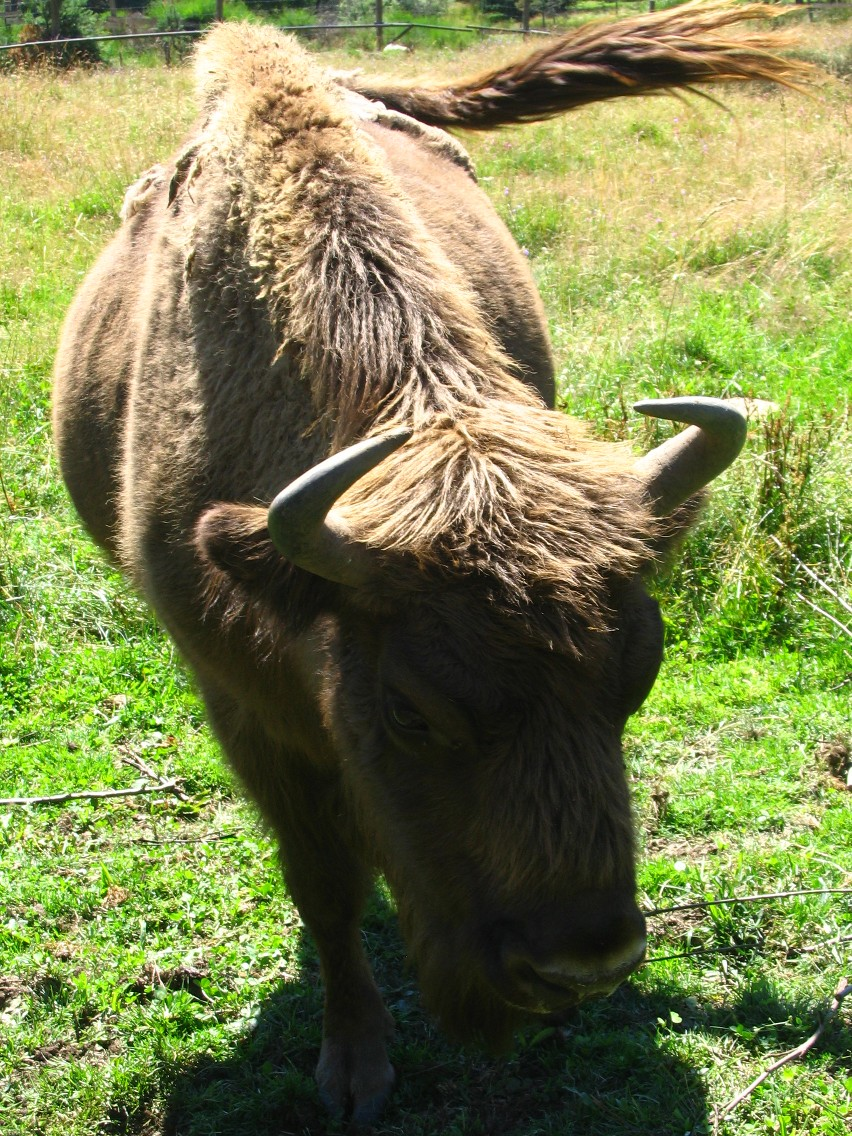 Hou, que j'ai peur ! Spécimen de la réserve des bisons d'Europe de Ste-Eulalie en Margeride, Lozère, à l'air bien menaçant.